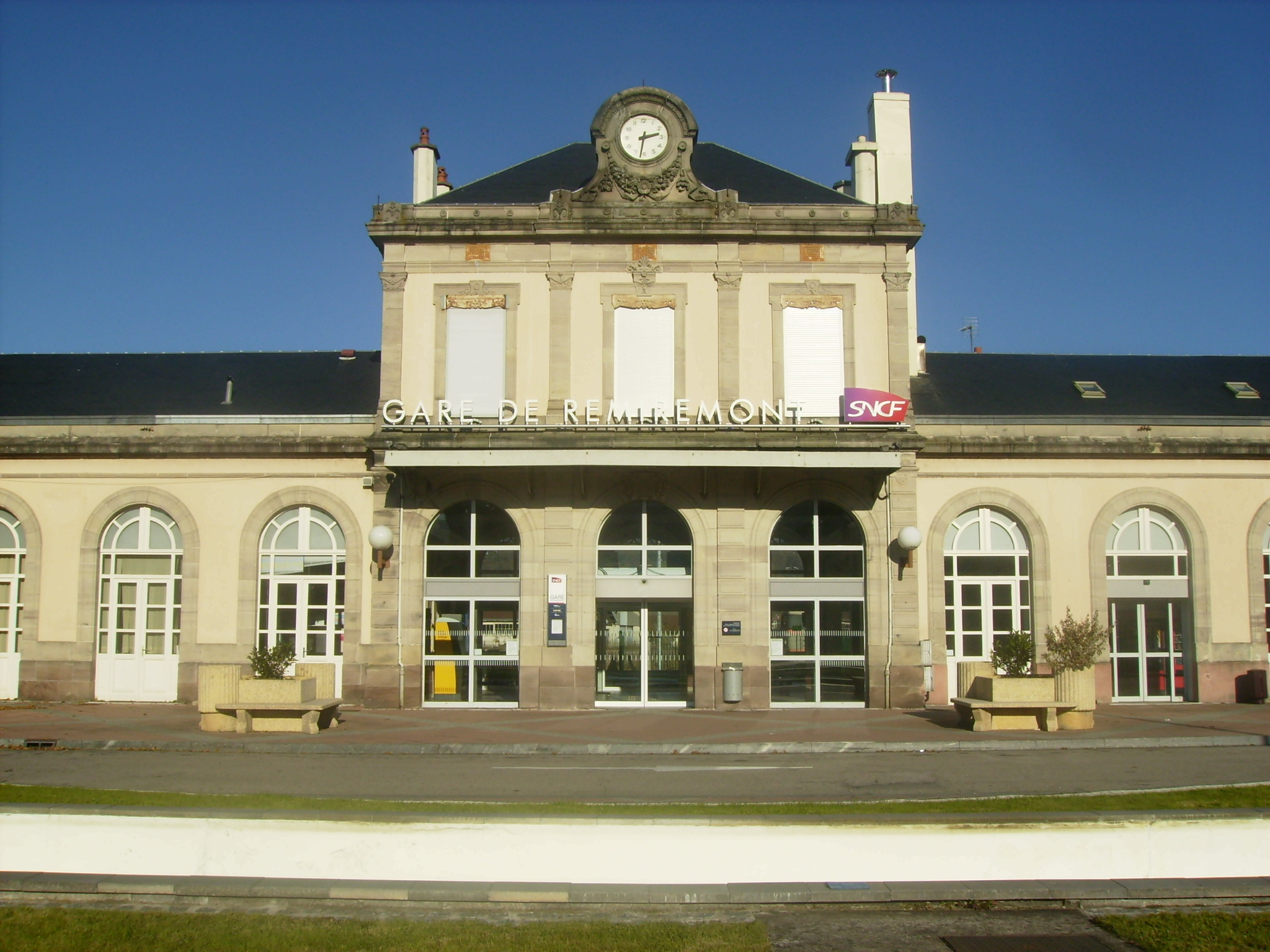 Facade de la gare de Remiremont